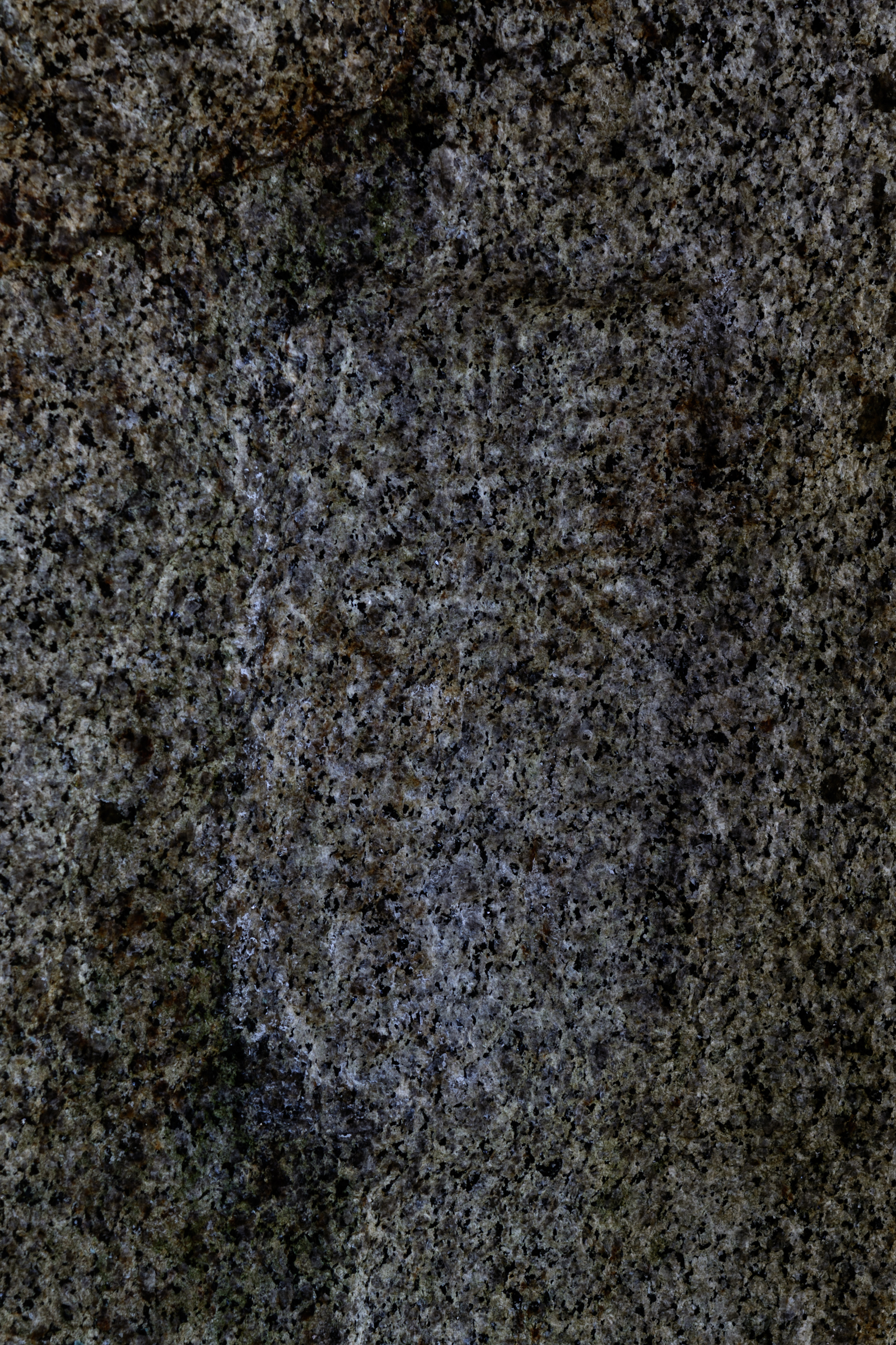 疱瘡地蔵（奈良市柳生町）、右下部に刻まれた徳政碑文拡大。右上から「正長」とかろうじて読めるものの、大半は判別が困難な状態にある。